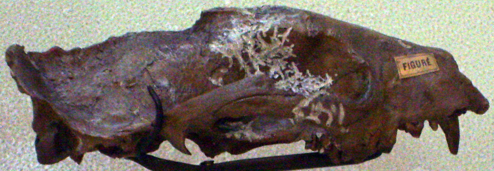 Herpestes lemanensis skull, Muséum national d'histoire naturelle, Paris.